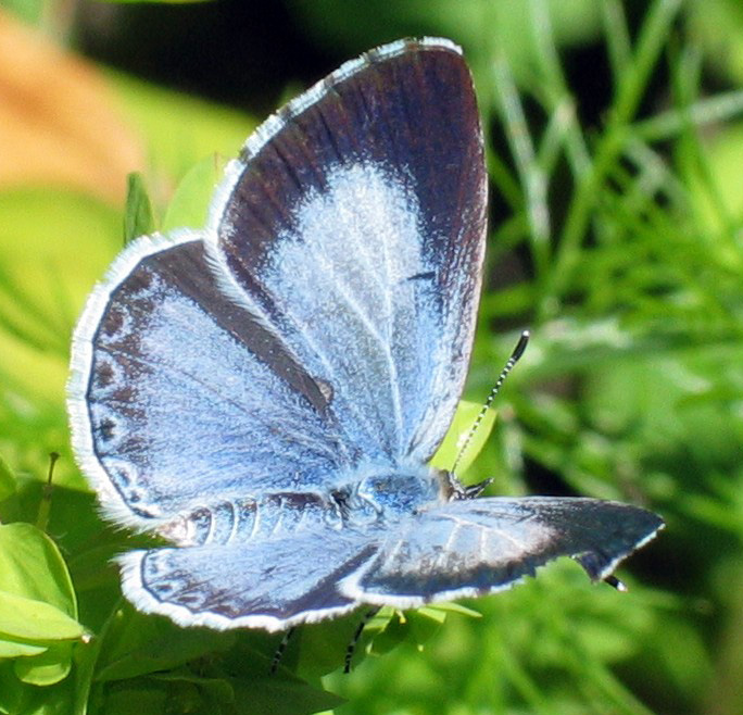 ein weiblicher Faulbaum-Bläuling (lateinisch Celastrina argiolus ♀)